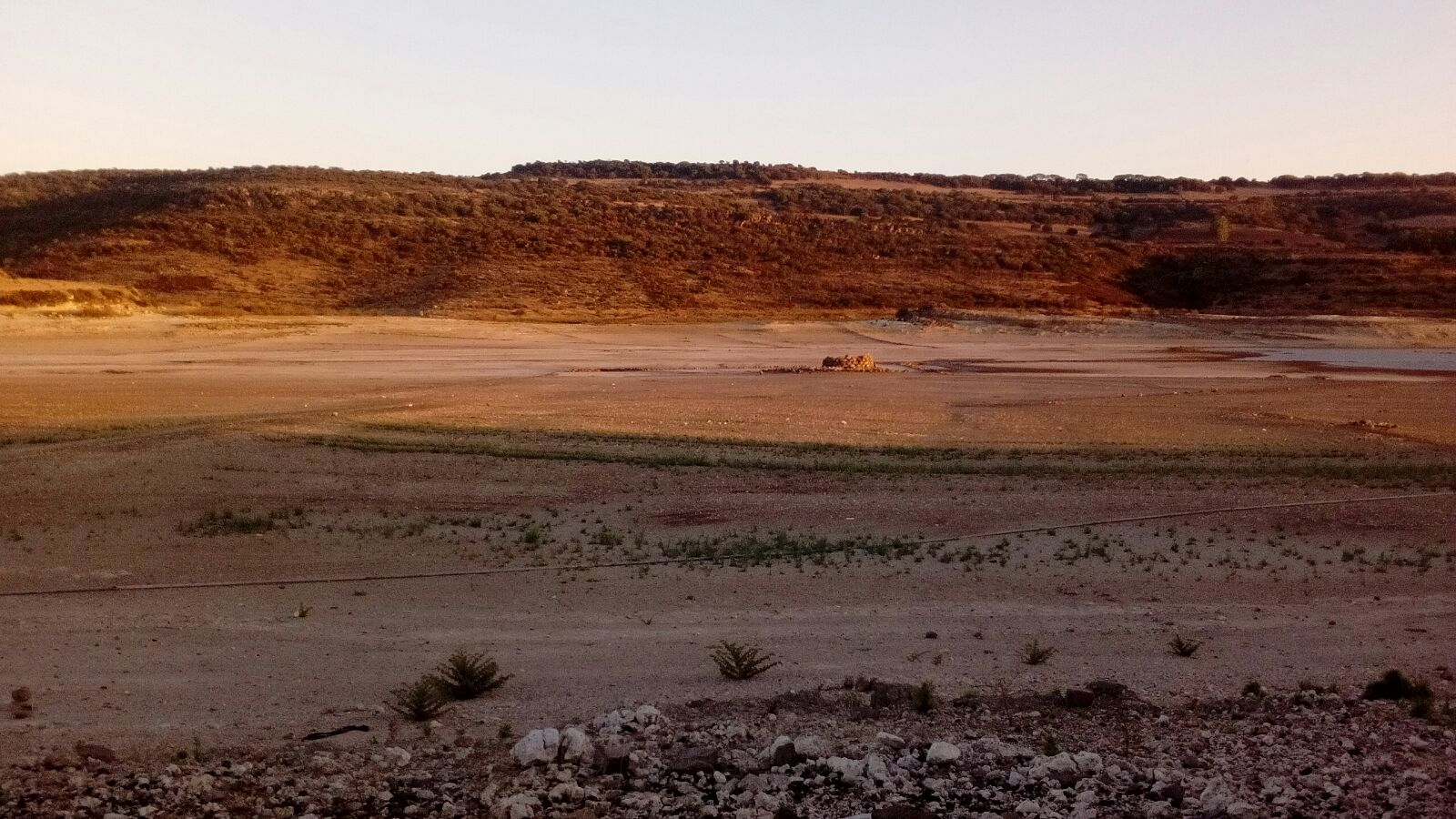 Parte orientale del lago Cuga in secca durante la siccità dell'estate 2017. Visibile il nuraghe Chessedu, normalmente scoperto. Scattata la sera del 21 agosto 2017 in mia presenza da amico che ha autorizzato pubblicazione.